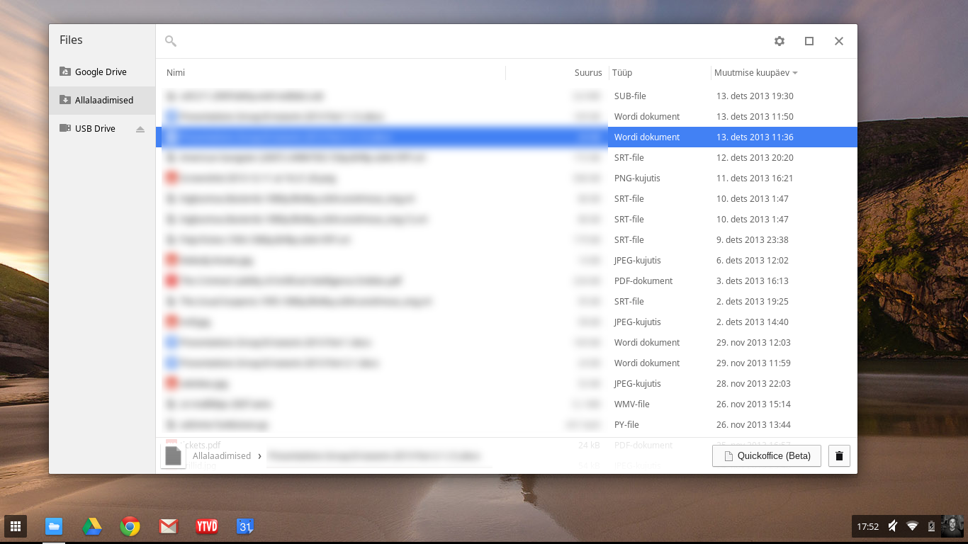 Chrome OS failihaldur